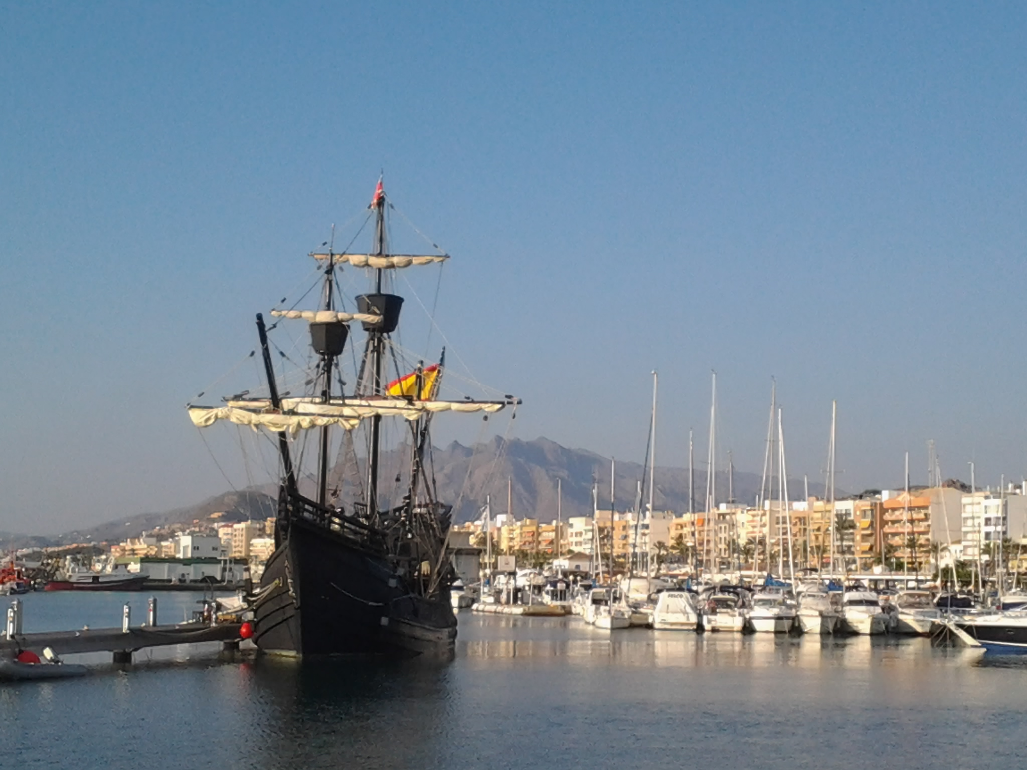 Vista del puerto de Garrucha, Andalucía, en septiembre de 2013.